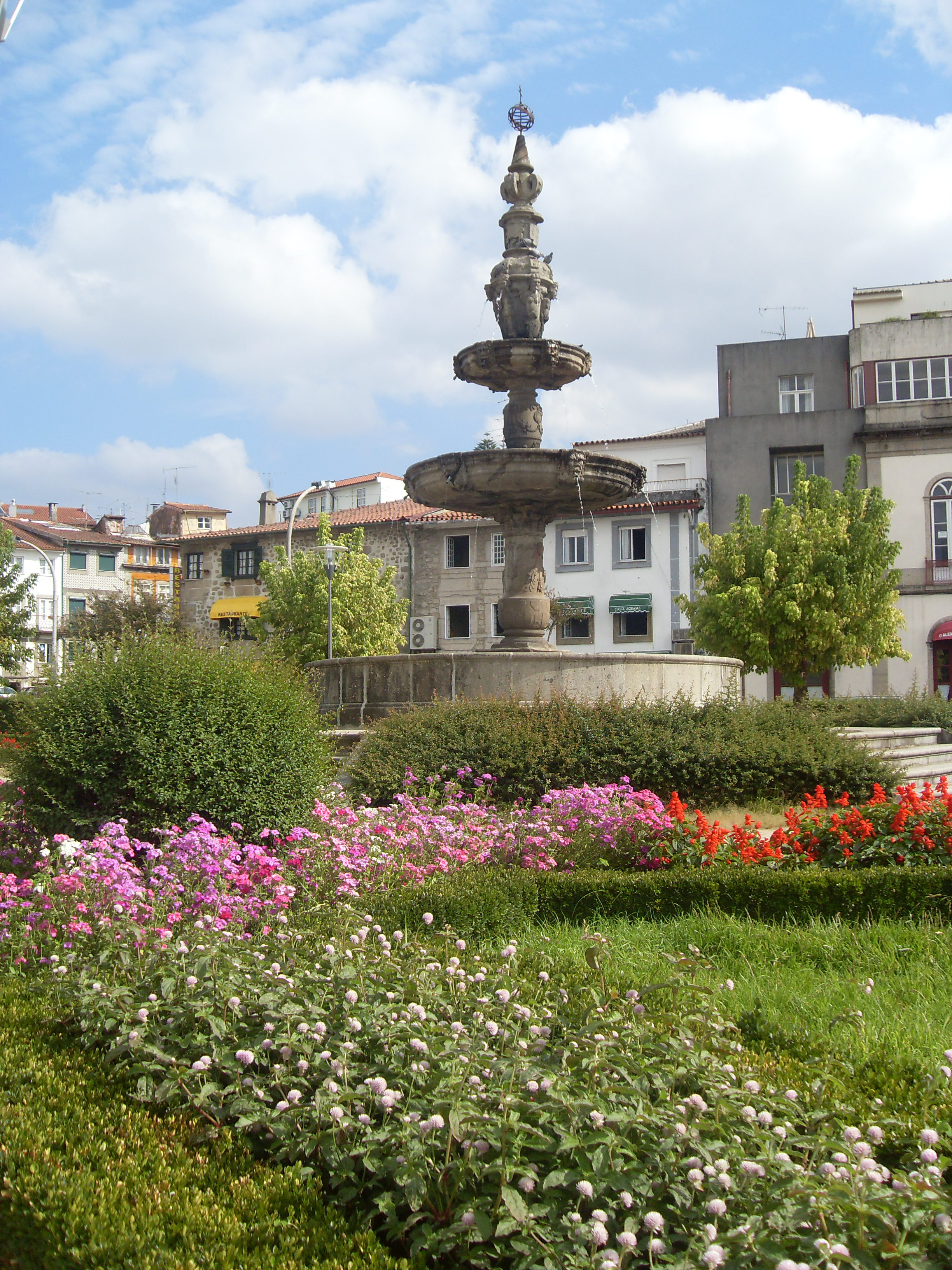 Fonte do Campo das Hortas, localizada na praça de mesmo nome, em frente ao Arco da Porta Nova.